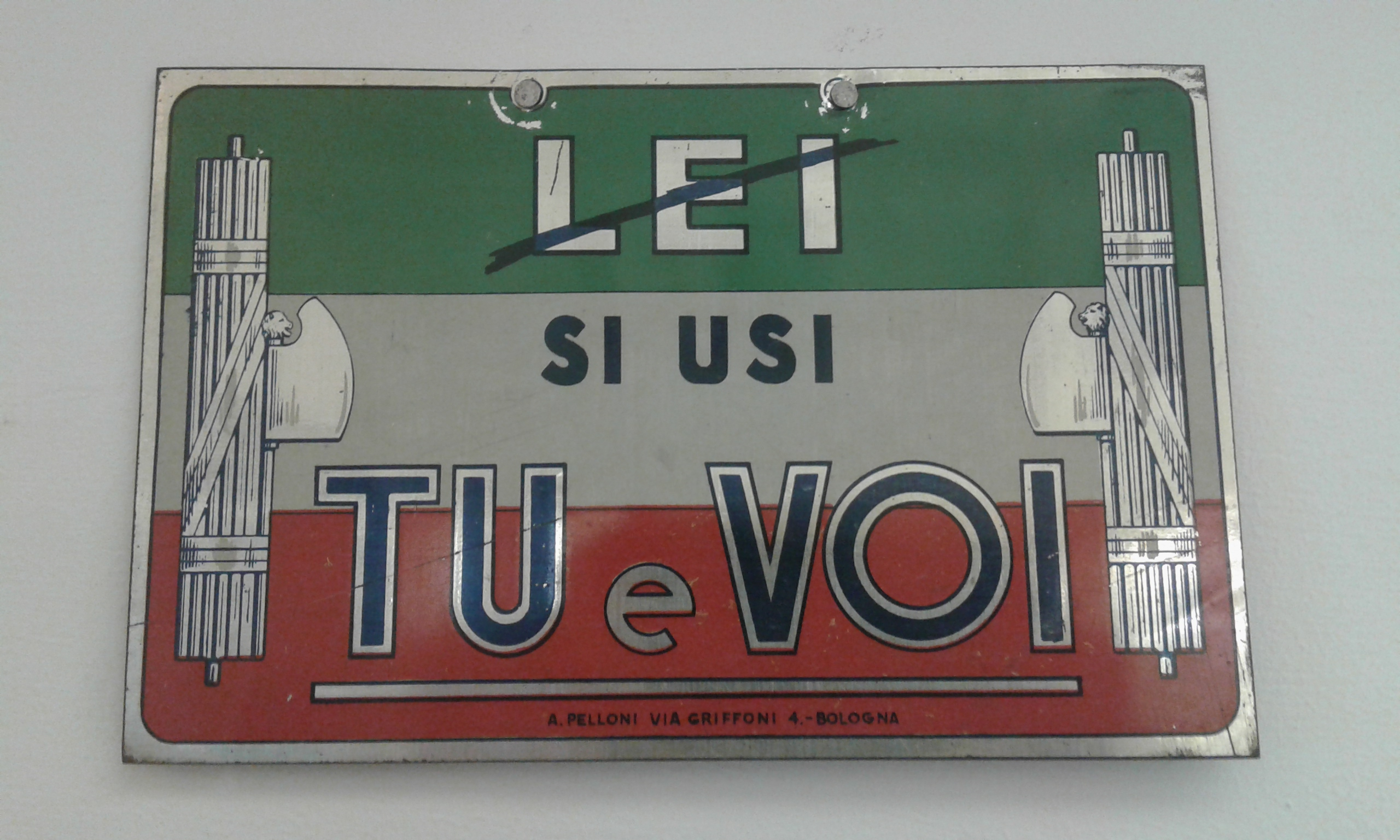 Targa